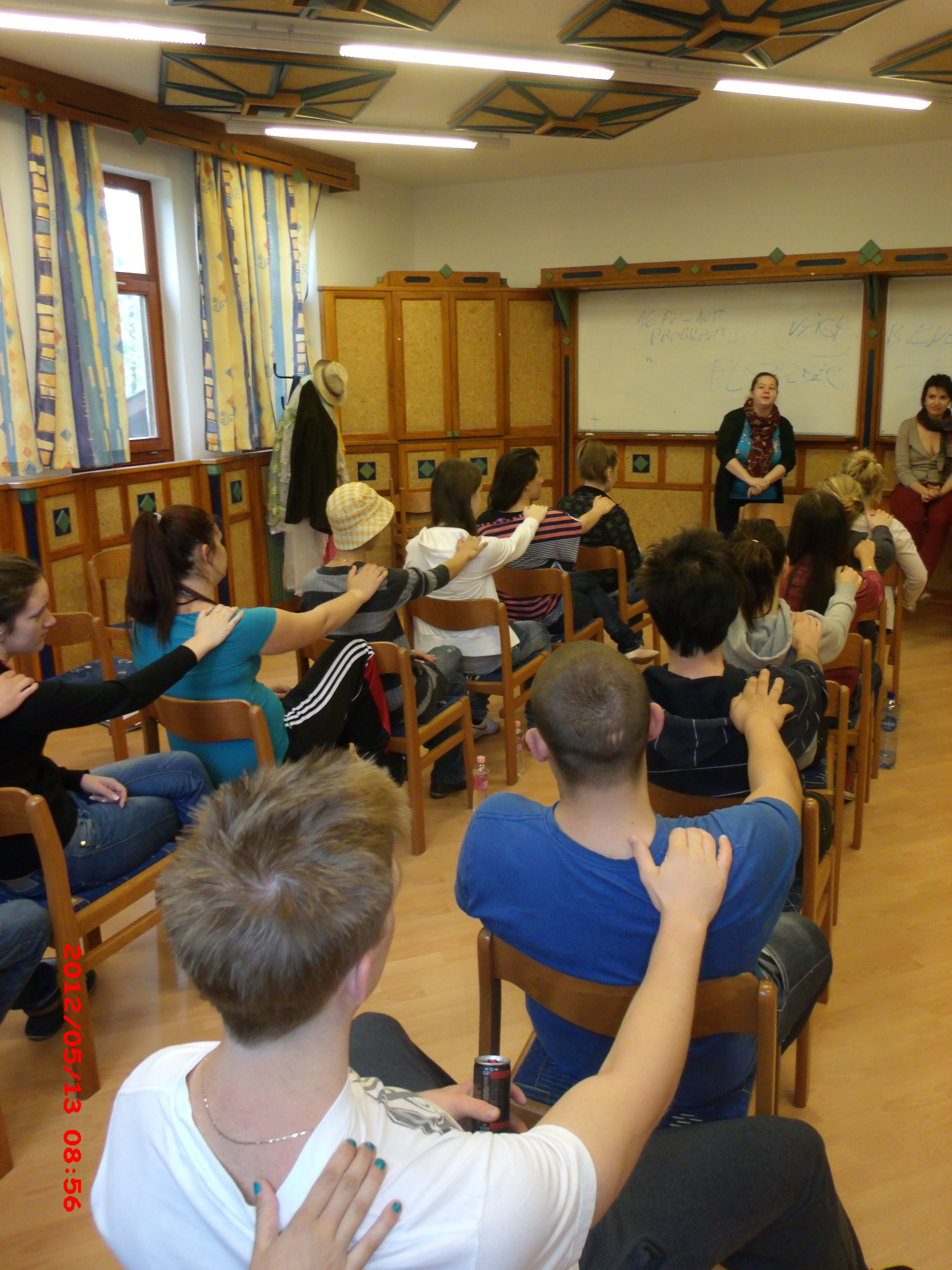 Demó program